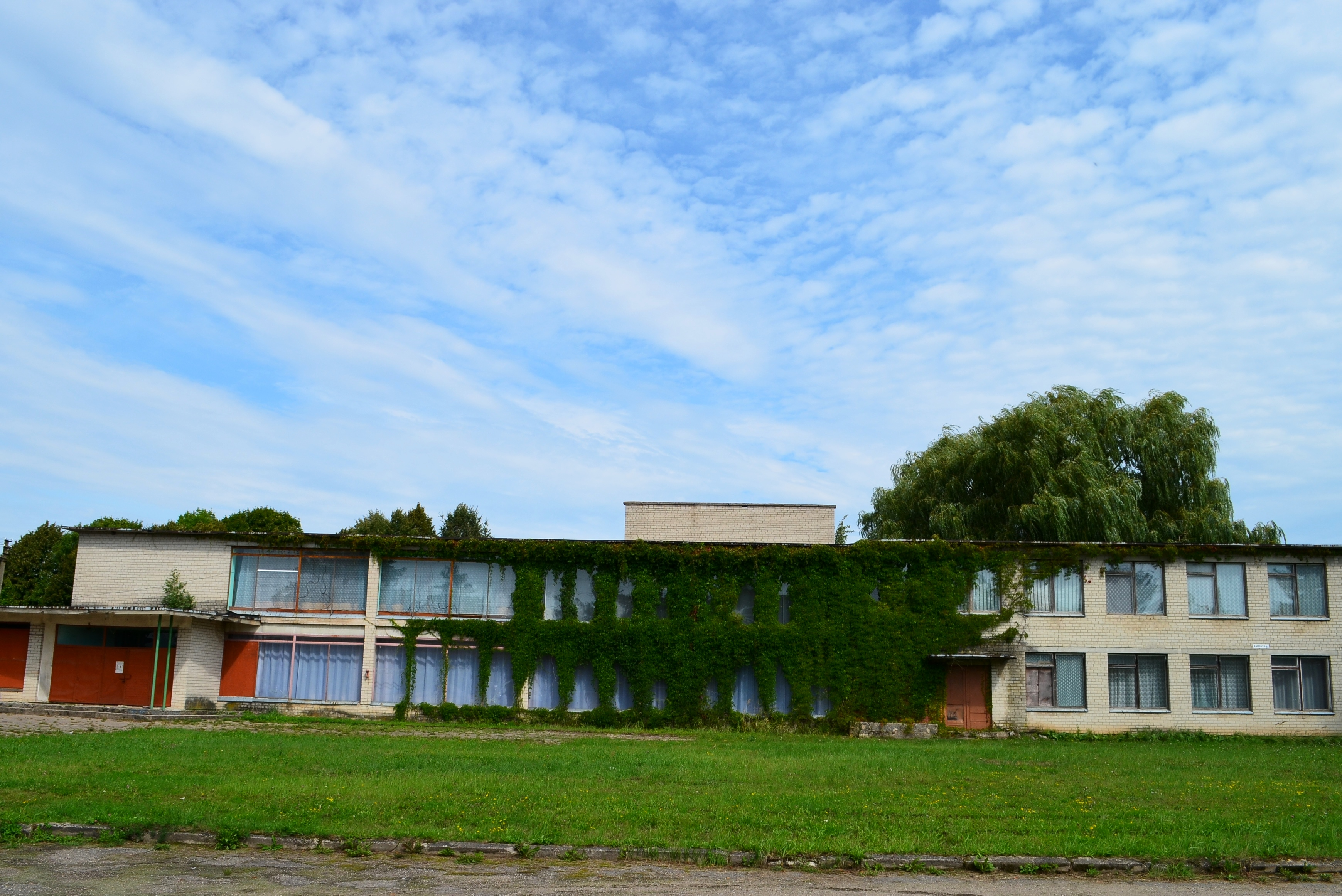 Ramoniškiai, Vilkaviškio raj.